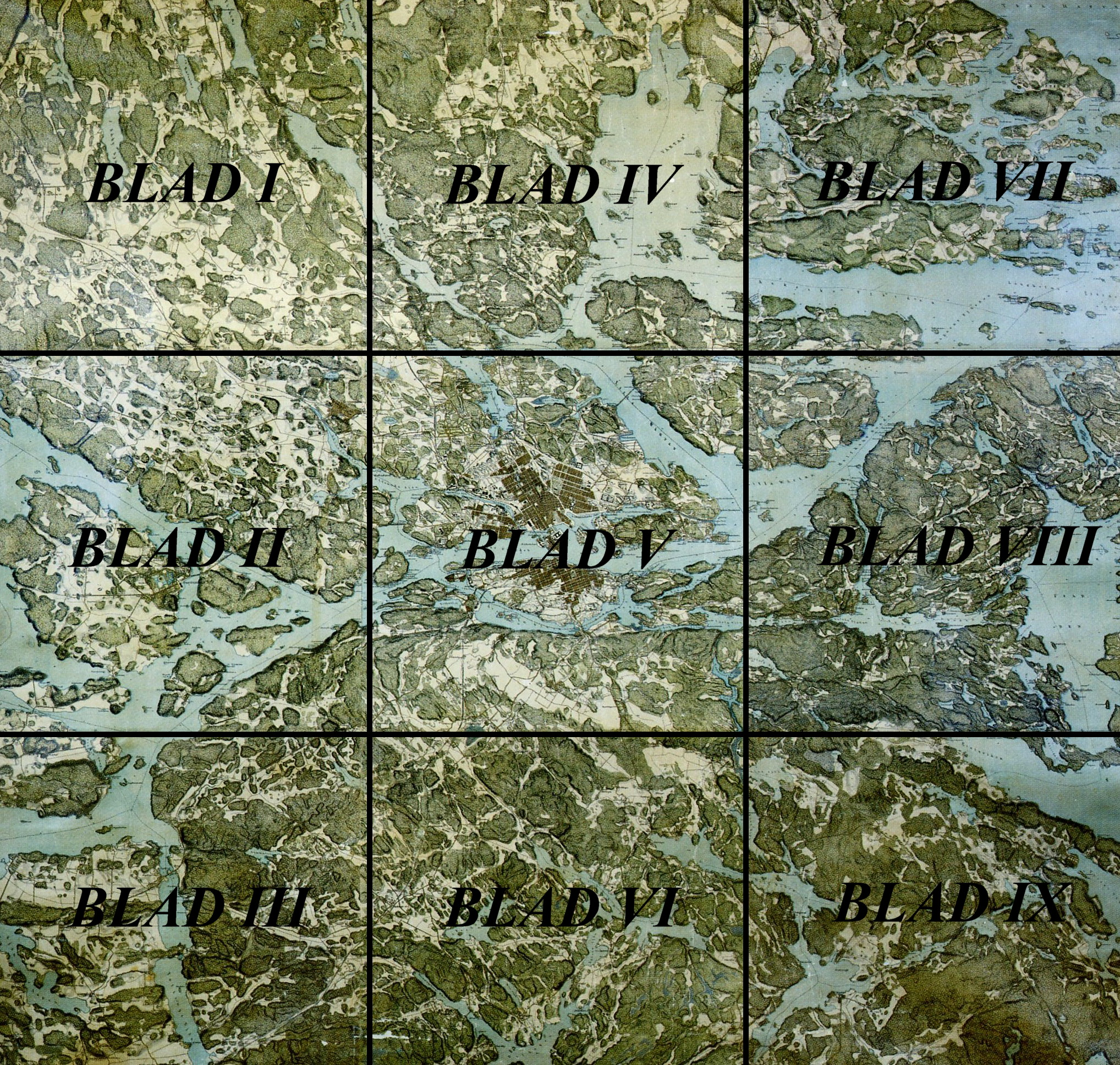 “Topografiska corpsens karta, "Trakten omkring Stockholm i IX blad" utgiven 1861 överarbetad 1893, här en översikt med bladindelningen.